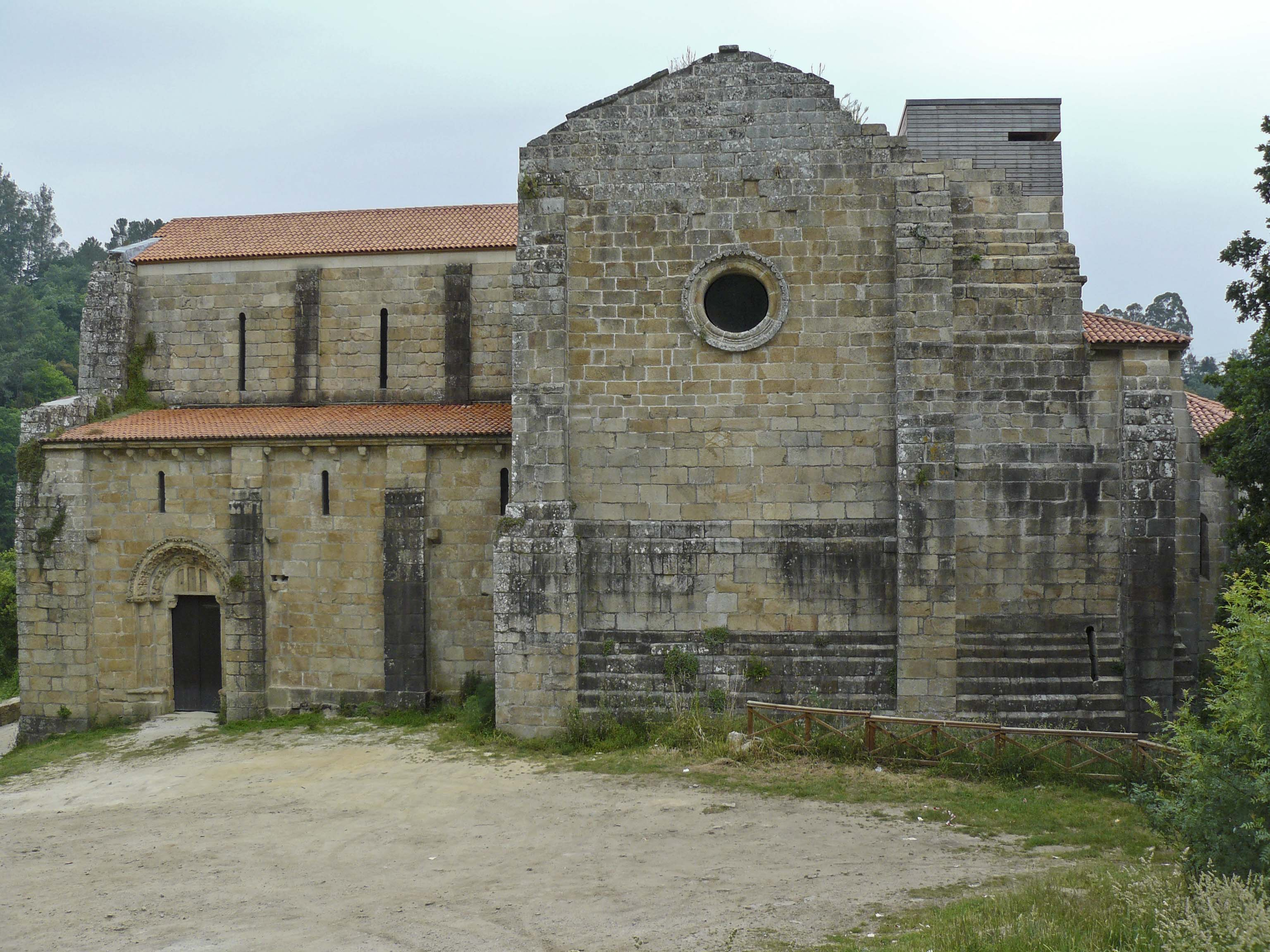 Mosteiro de San Lourenzo de Carboeiro Silleda